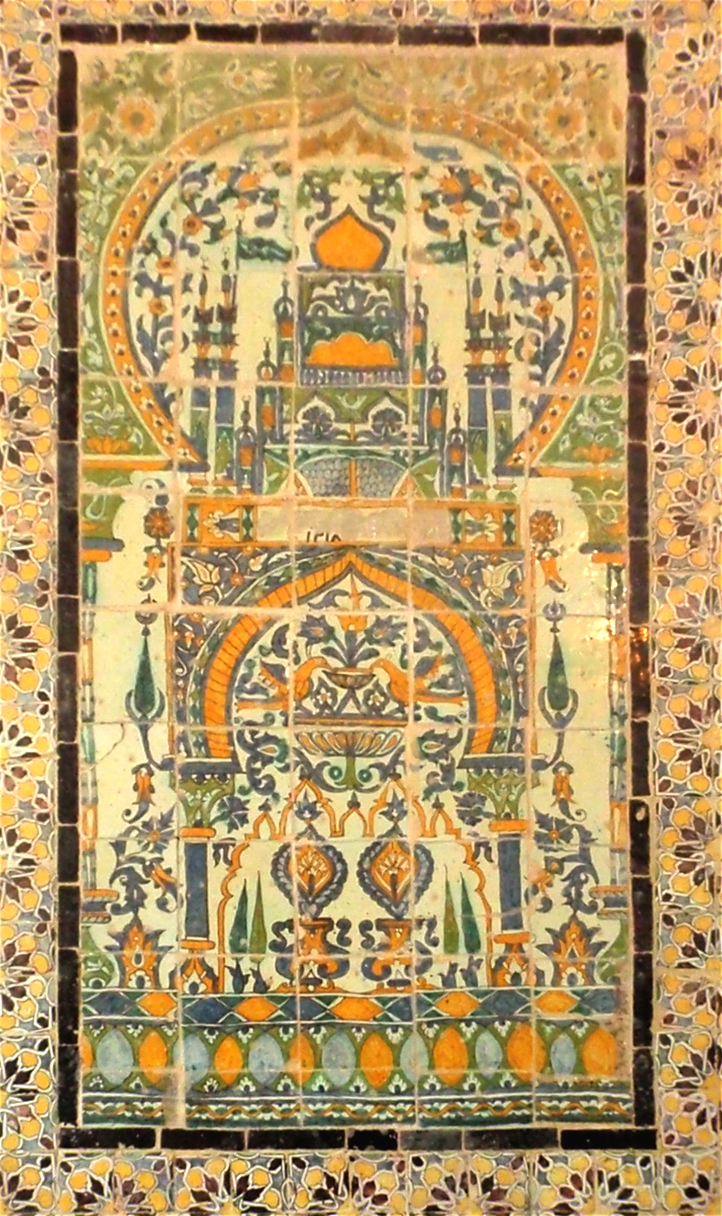 faïence